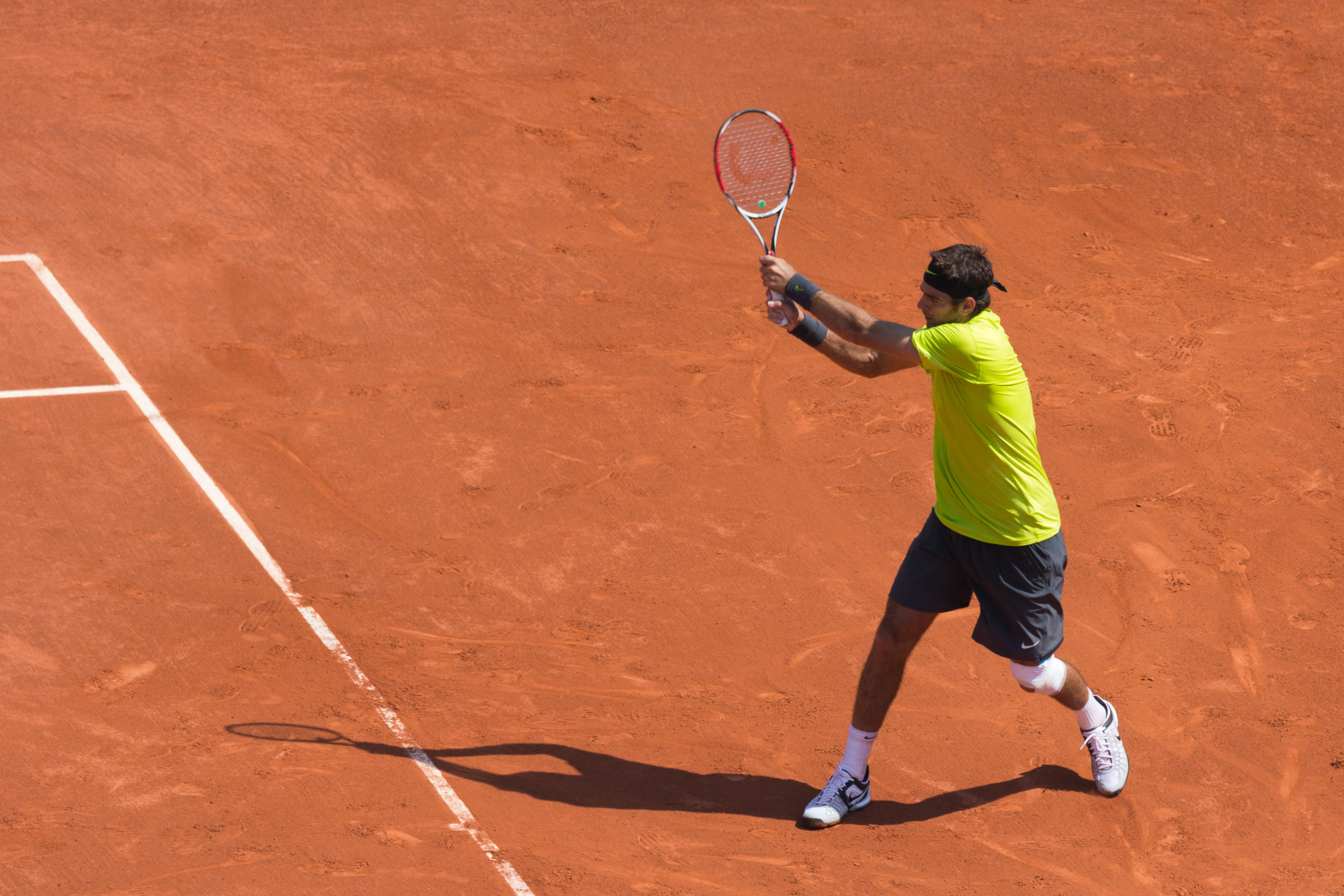 Juan Martín del Potro à Roland-Garros le 27 mai 2012, match contre Albert Montañés. Paris, France